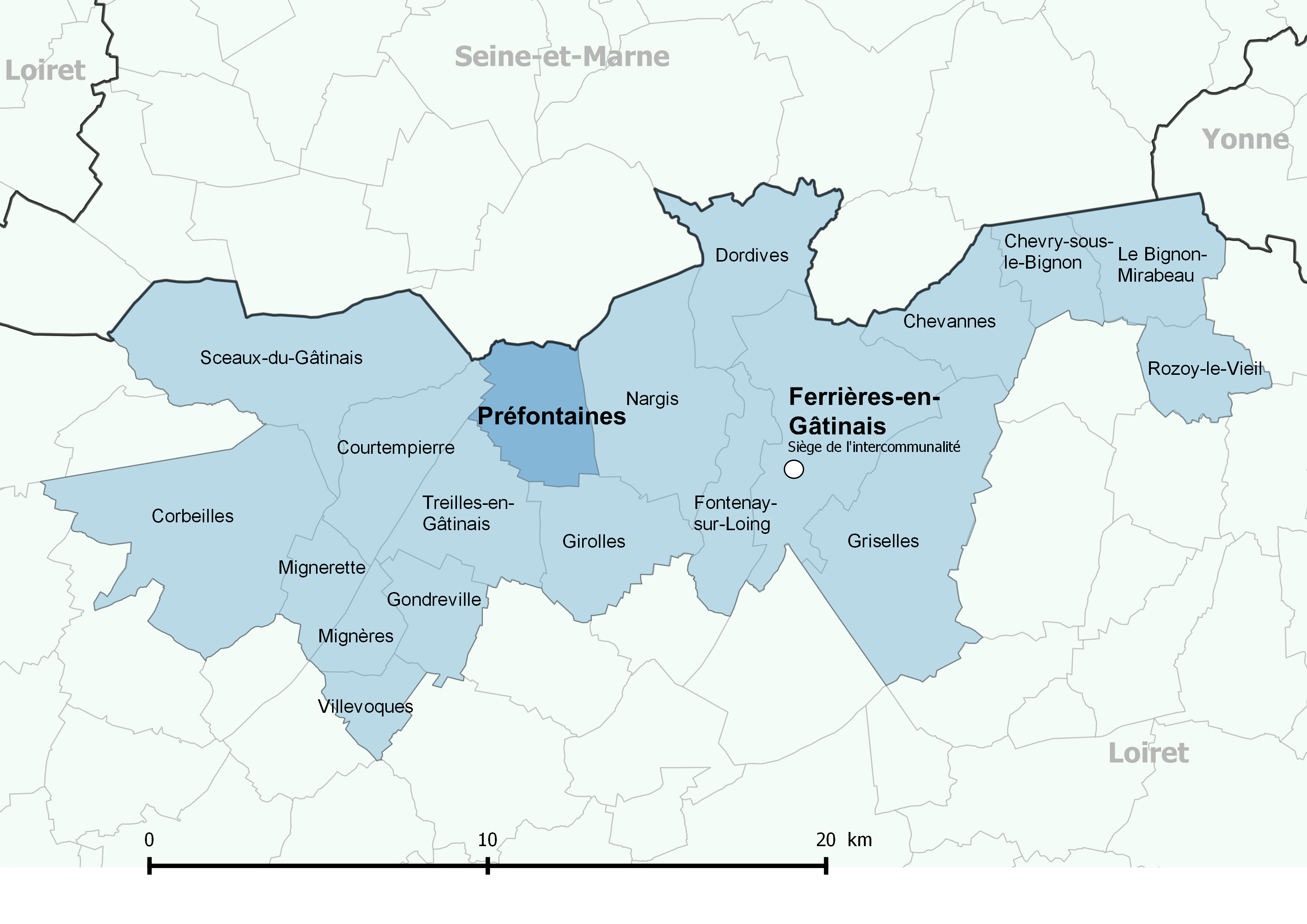 Périmètre de la communauté de communes des Quatre Vallées (Loiret) - Positionnement de la commune de Préfontaines.